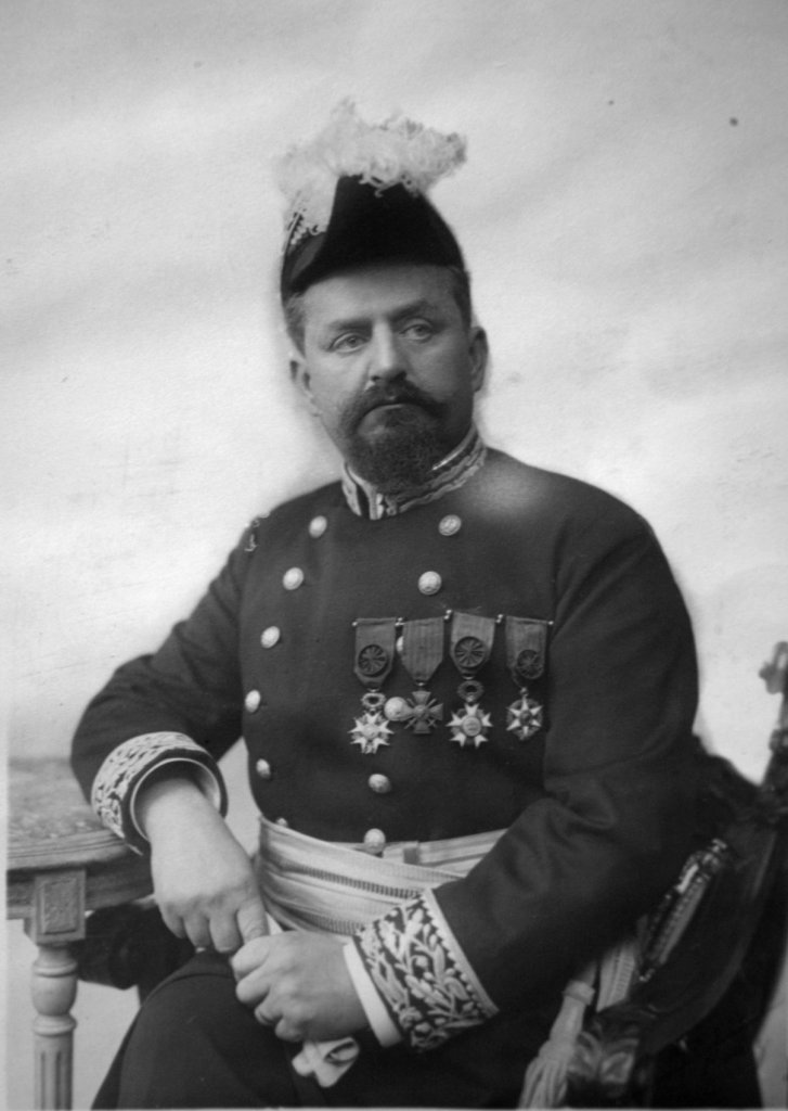 Député français 1906-1910